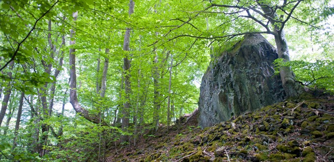 Frostavallen Strövområde, Skåne, Sverige